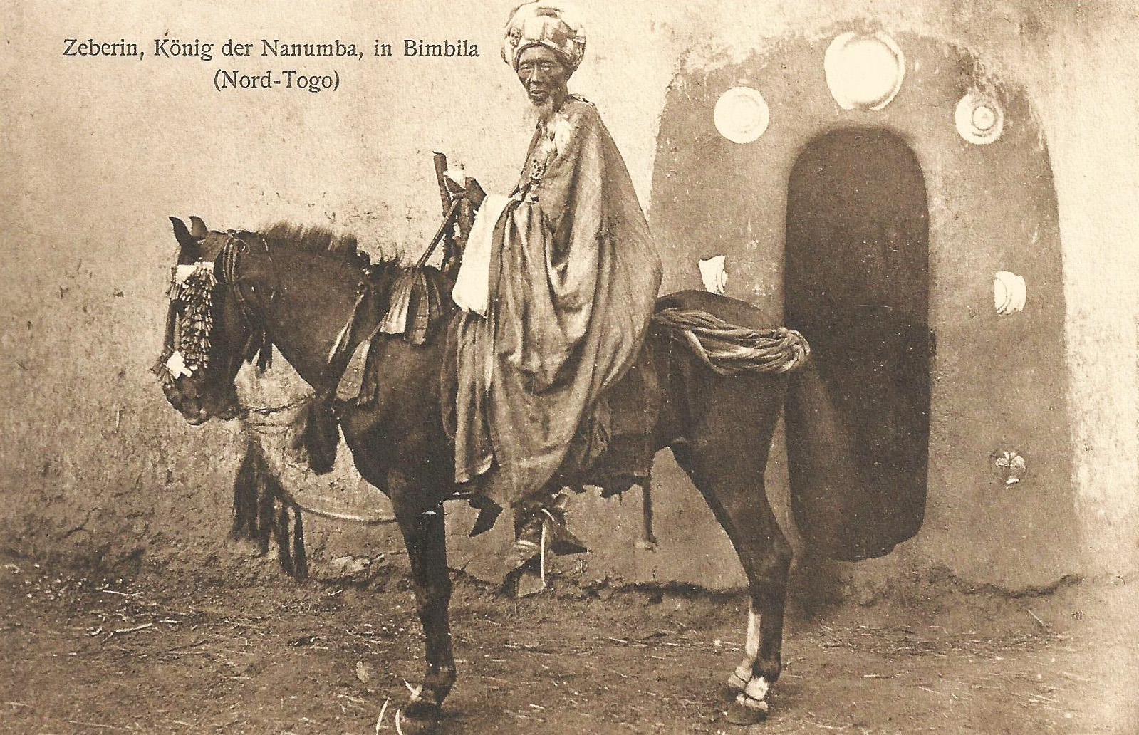 Zeberin, König der Nanumba, in Bimbila (Nord-Togo). ??? [Doutes sur la localisation dans le titre : il s'agit plutôt du Ghana.] Carte postale ancienne, sans indication d'auteur, d'éditeur ou de date. Collection particulière